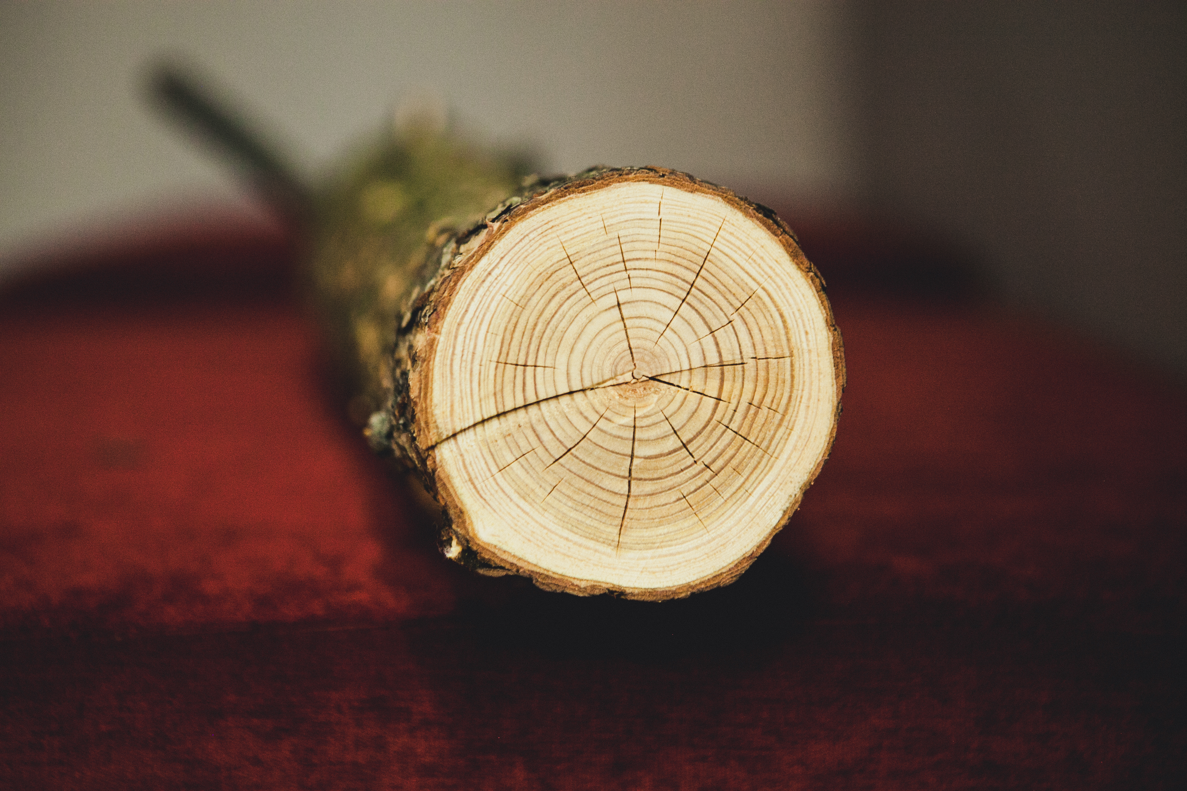 Фестиваль ТвинПикс.txt в библиотеке им. Н.А.Некрасова